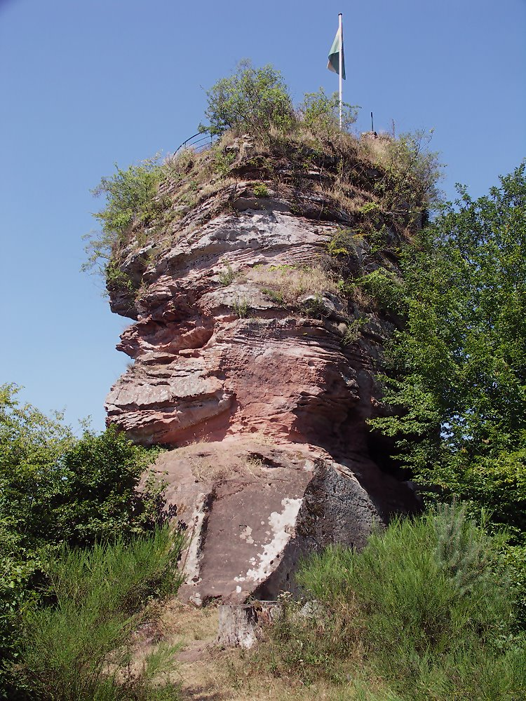 Falkenburg, Stirnseite des Felsens Fotograf oder Zeichner: Peter Schmenger